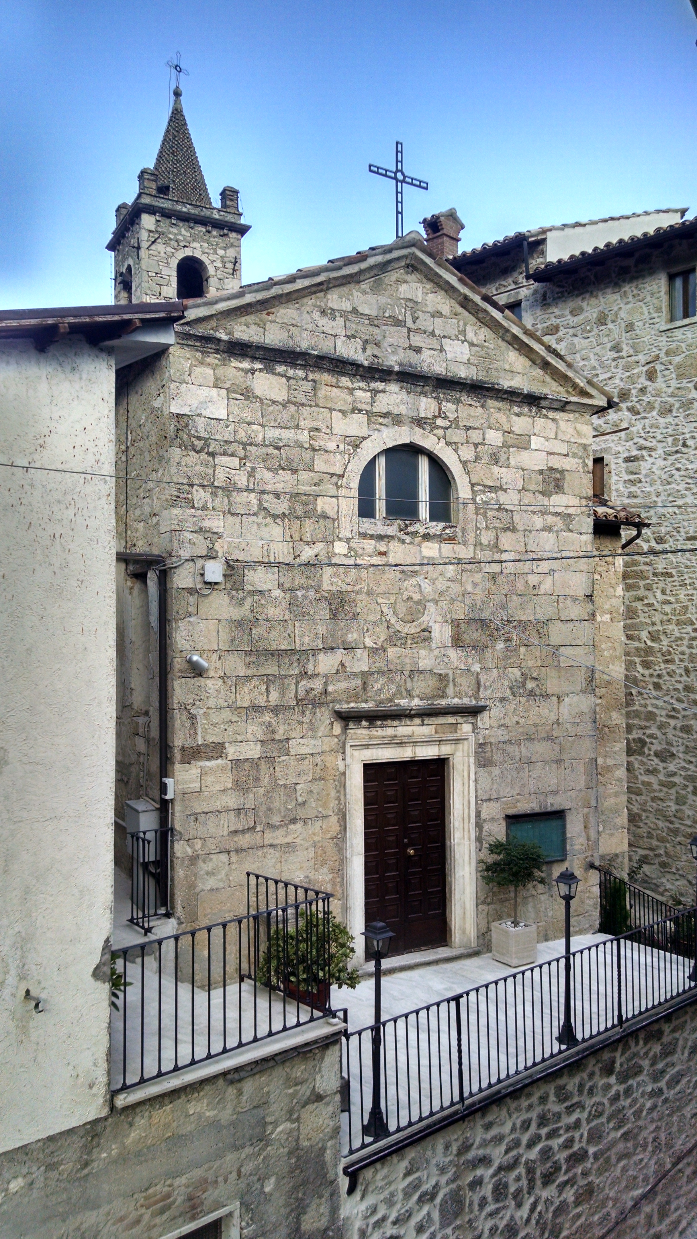 Fondata nel 1200 costruita in travertino delle cave locali.